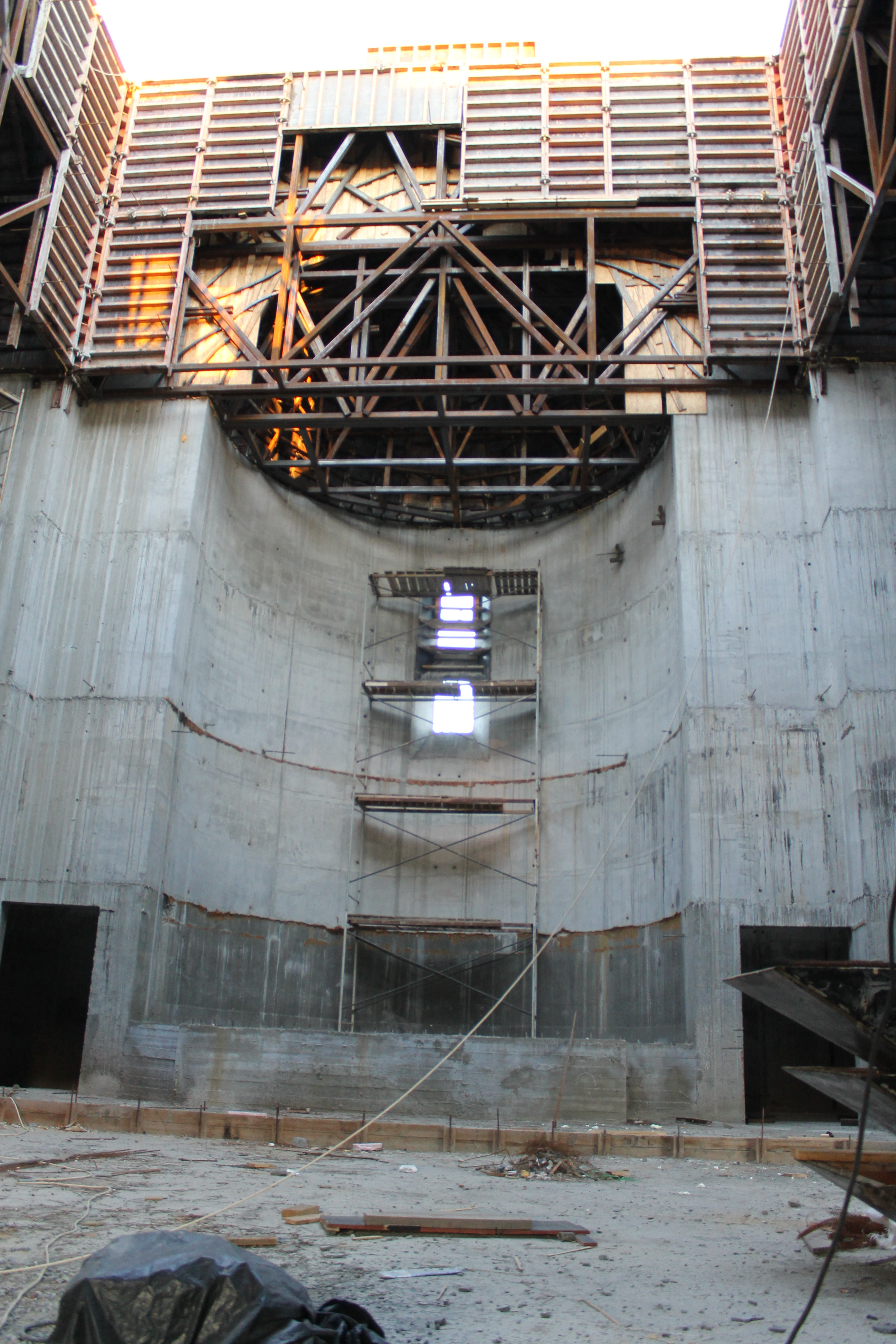 Строительство храма, октябрь 2014 г.